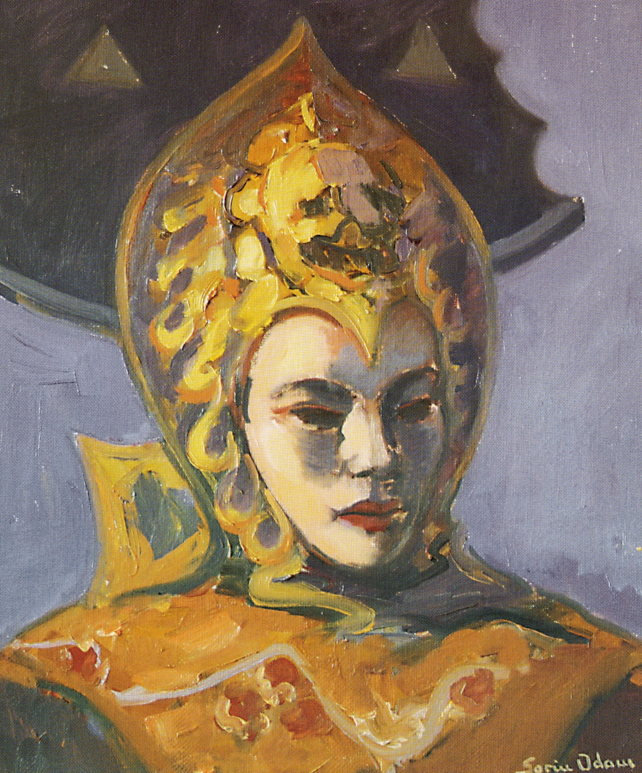 Sorin Adam - Masca Venetiana, 50x60, u/p